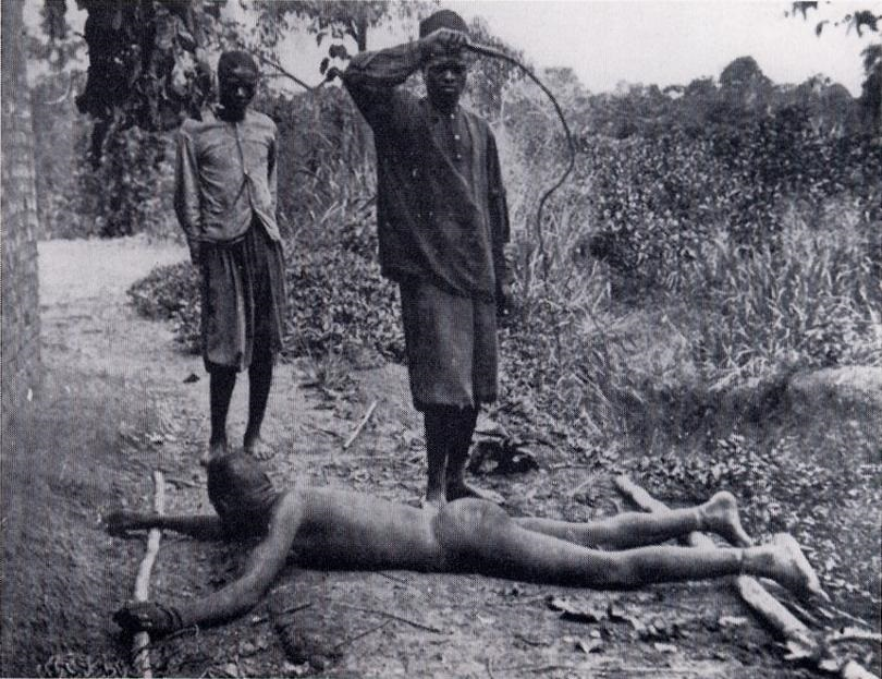 Esclave fouetté avec une chicotte, État indépendant du Congo (Congo belge), XIXe siècle.